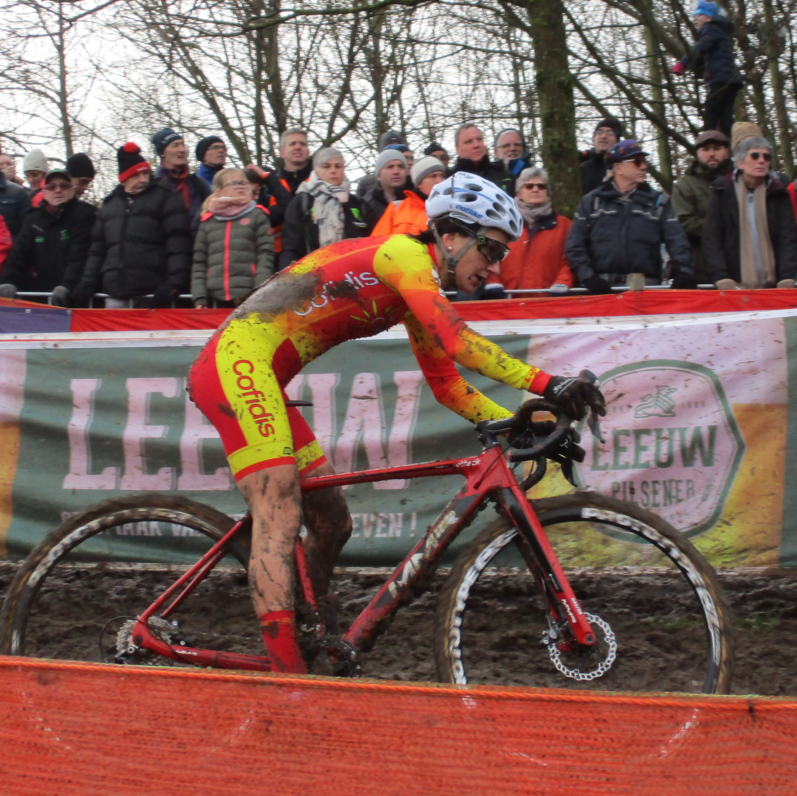 Wereldkampioenschappen Veldrijden op 3 en 4 februari 2018 op de Cauberg in Valkenburg, Limburg, Nederland. Wedstrijd van de vrouwen elite. Ronde 3 van 4.